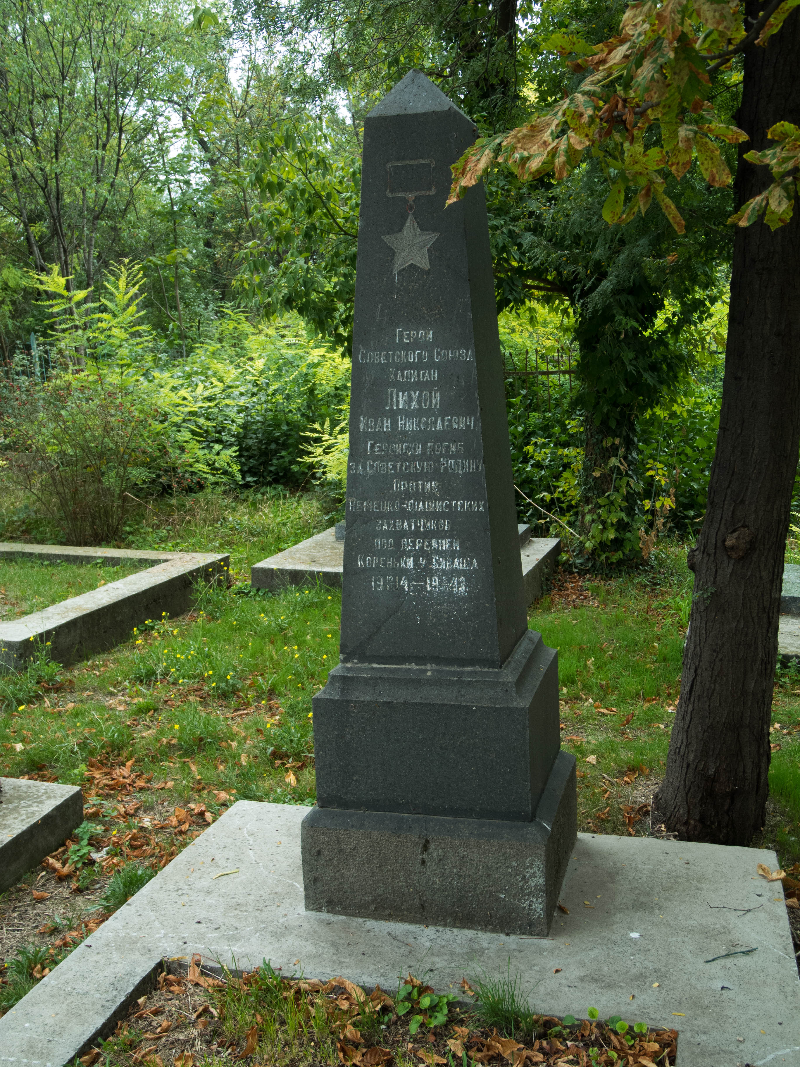 Могила Героя Радянського Союзу капітана І. Н. Лихого, 1943 р., 1944 р. (перепоховання), Сімферополь, пр. Кірова, 1-е цивільне кладовище, на південь від огорожі з боку стадіону «Локомотив»